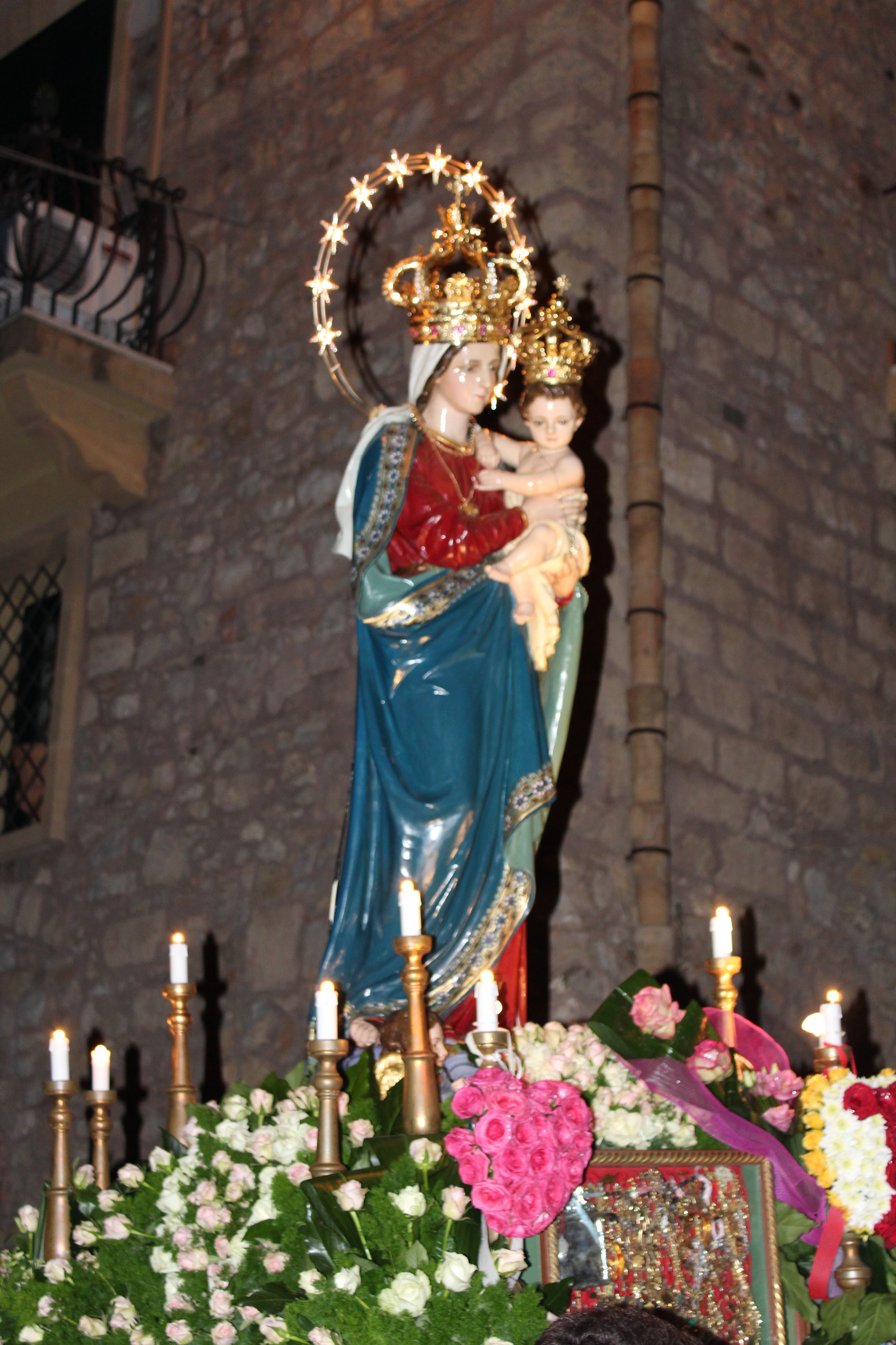 Statua della Madonna delle Grazie che si venera a Trabia (PA)